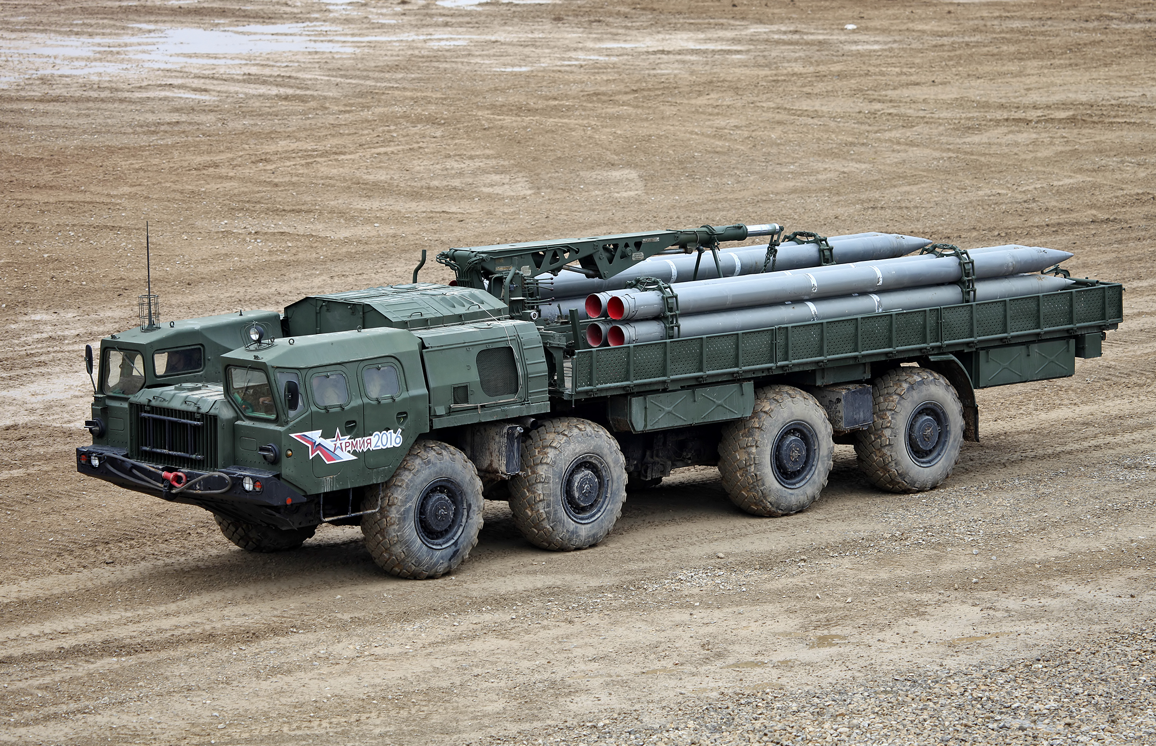 Транспортно-заряжающая машина 9Т234-2 РСЗО 9К58 Смерч (9T234-2 transporter-loader of 9K58 / BM-30 Smerch MLRS)